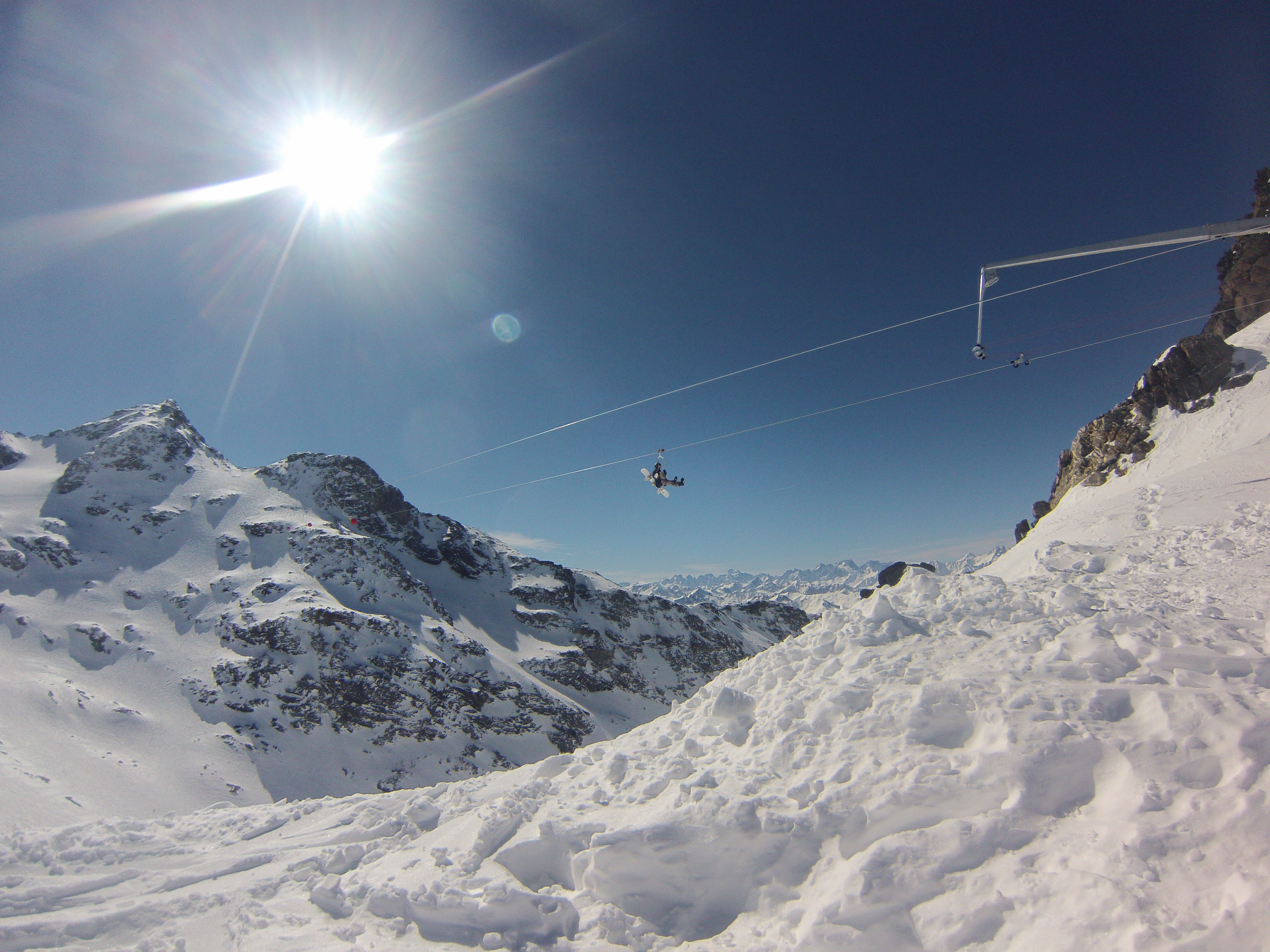 Un vol plané de 1300 m de long, 1min 45 de pur plaisir dans un panorama à couper le souffle, depuis le point culminant des 3 Vallées à 3230 m, au sommet du Télésiège du Bouchet sur le domaine d’Orelle, pour relier la crête de Val Thorens, à 3000 m, au sommet du Funitel de Thorens. D’Orelle à Val Thorens, suspendu à un filin d’acier, bien installé dans un cocon de tissu qui vous fera franchir la barre des 100 km/h, vous vivrez l’émotion d’un grand rapace planant au-dessus des espaces infinis. Le sol s’éloigne, vous voilà entre ciel et terre pour un voyage où se mêlent émotion, bien-être et étonnement.